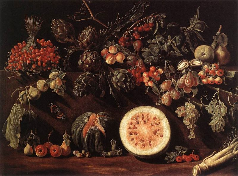 Frutos, vegetales y mariposa Fruits, Vegetables and a Butterfly